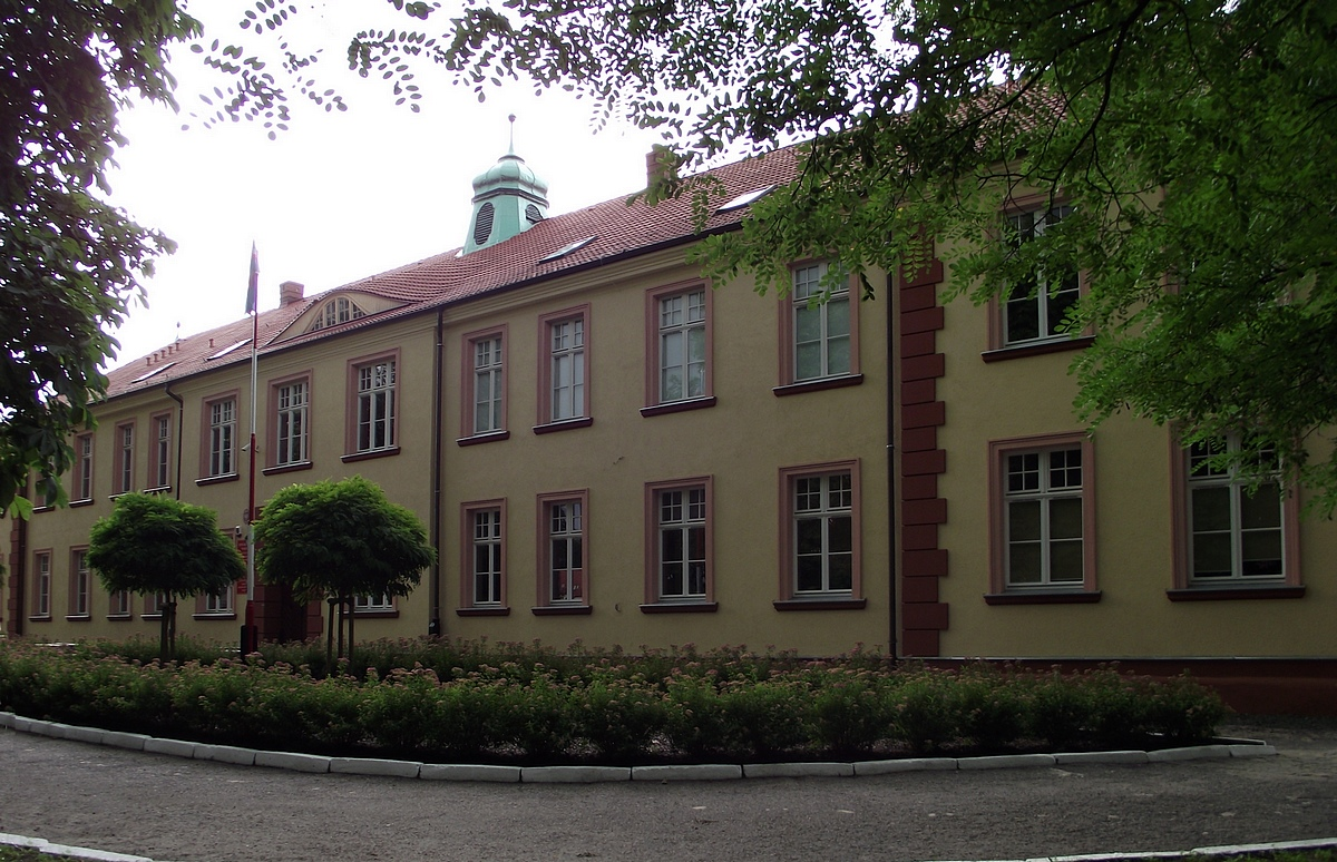 Wałcz, kolegium jezuitów (gimnazjum), 1798-1805, 1908-1909